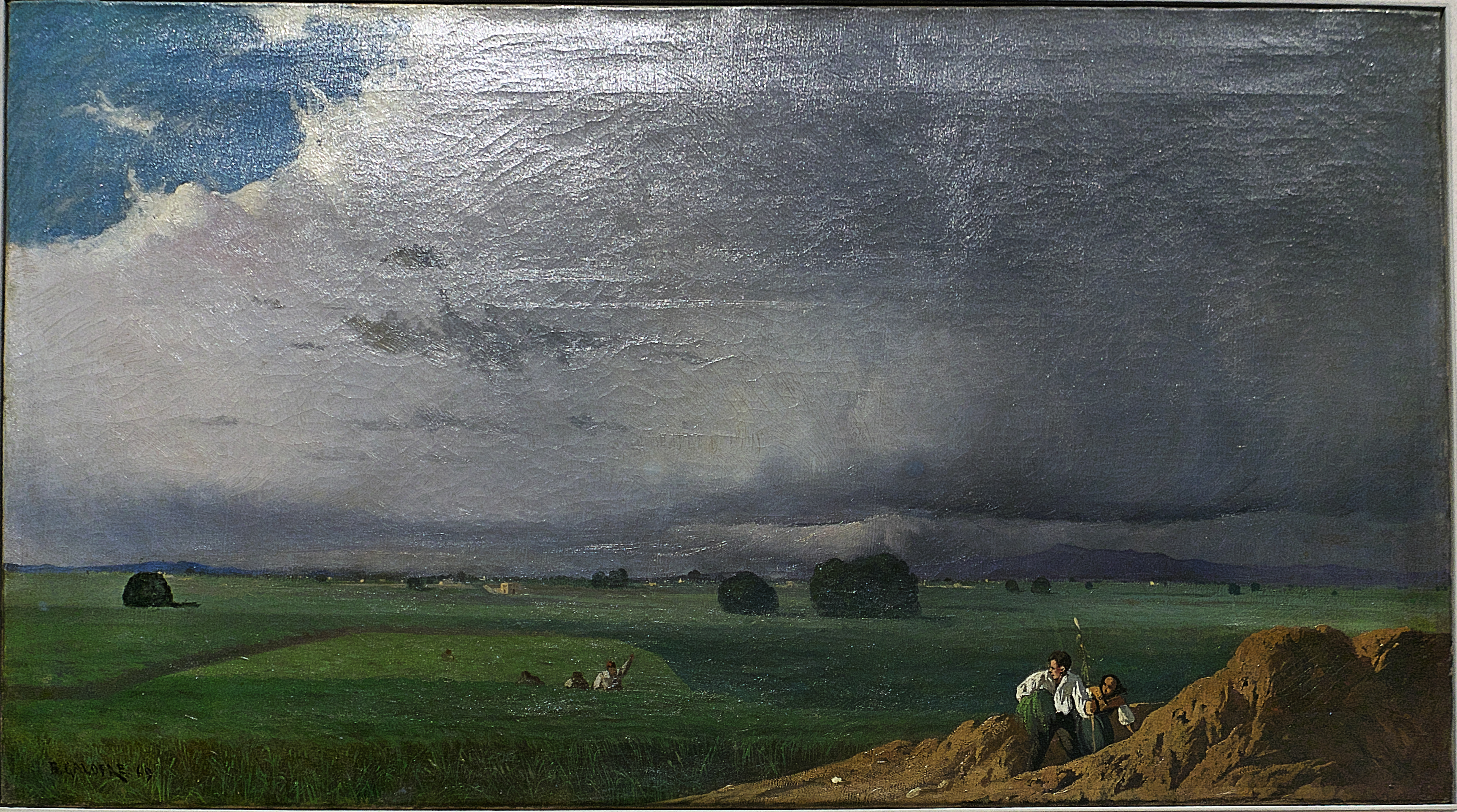 Pintura, óleo sobre lienzo, de Baldomero Galofre Jiménez (1869)